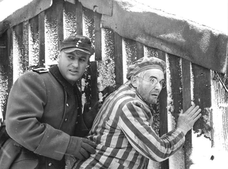 Zentralbild-DEFA frie 24.9.68 Berlin: "Wege übers Land" - Szenefoto Gefährlich ist der Auftrag, den der Kommunist Willi Hoyer (Manfred Krug) für die Partei übernommen hat: die Rettung des jüdischen Professors Pinarski (Marian Melman) aus dem KZ. Mit der Gestalt des aufrechten Patrioten Willi Heyer, den Jahre der Zuchthaushaft nicht brechen konnten, gelingt es Sakowski, das bessere Deutschland jener Jahre organisch und überzeugend in das Geschehen einzufügen. Die weibliche Hauptrolle in Helmut Sakowskis dramatischem Fernsehroman, der zur Zeit in fünf Folgen gesendet wird, übernahm Ursula Karusseit. Regie führte Martin Bokermann, der gleichzeitg auch das Drehbuch schrieb."